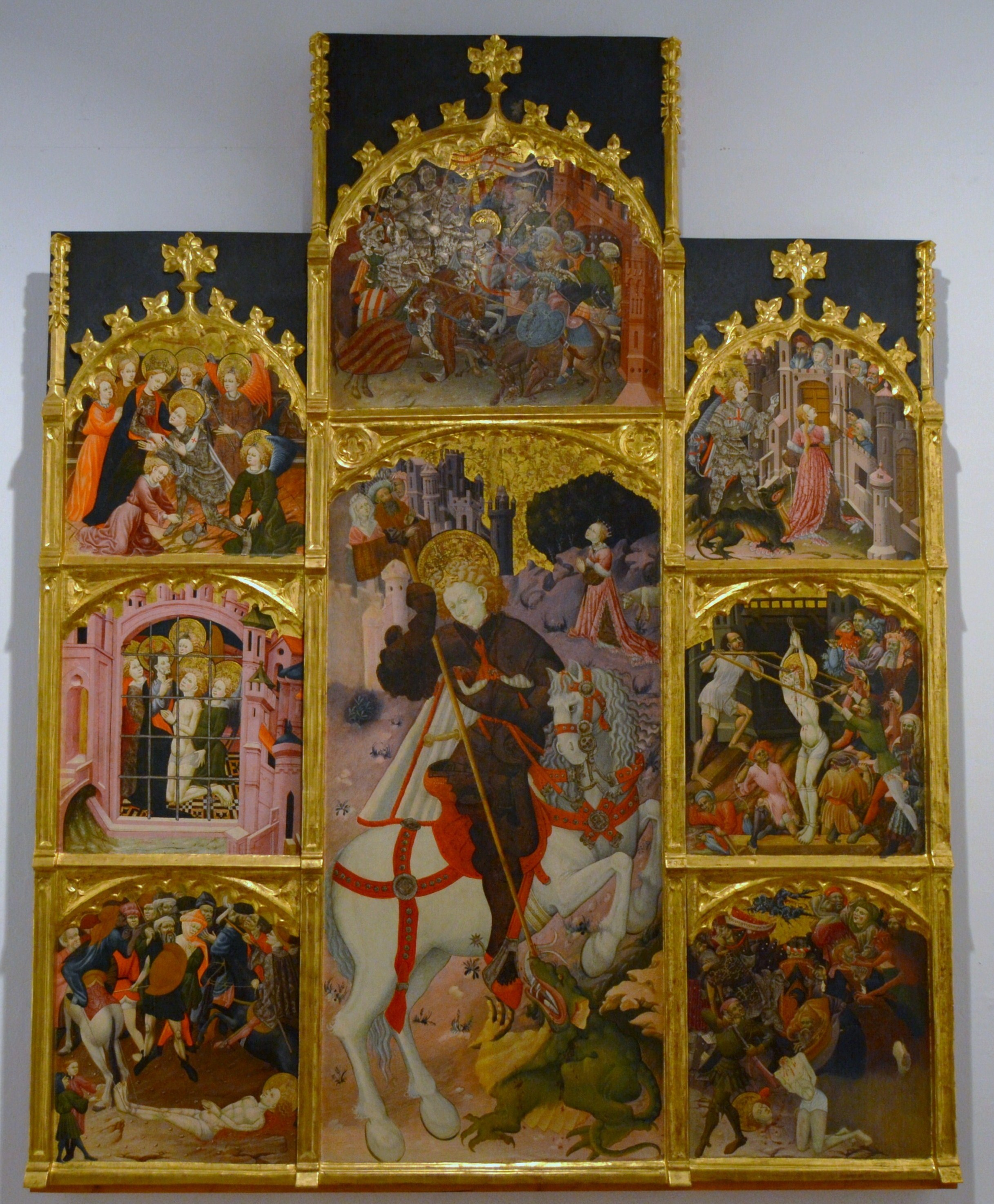 Retaule de sant Jordi de Xèrica, atribuït a Marçal de Sas o el seu cercle.